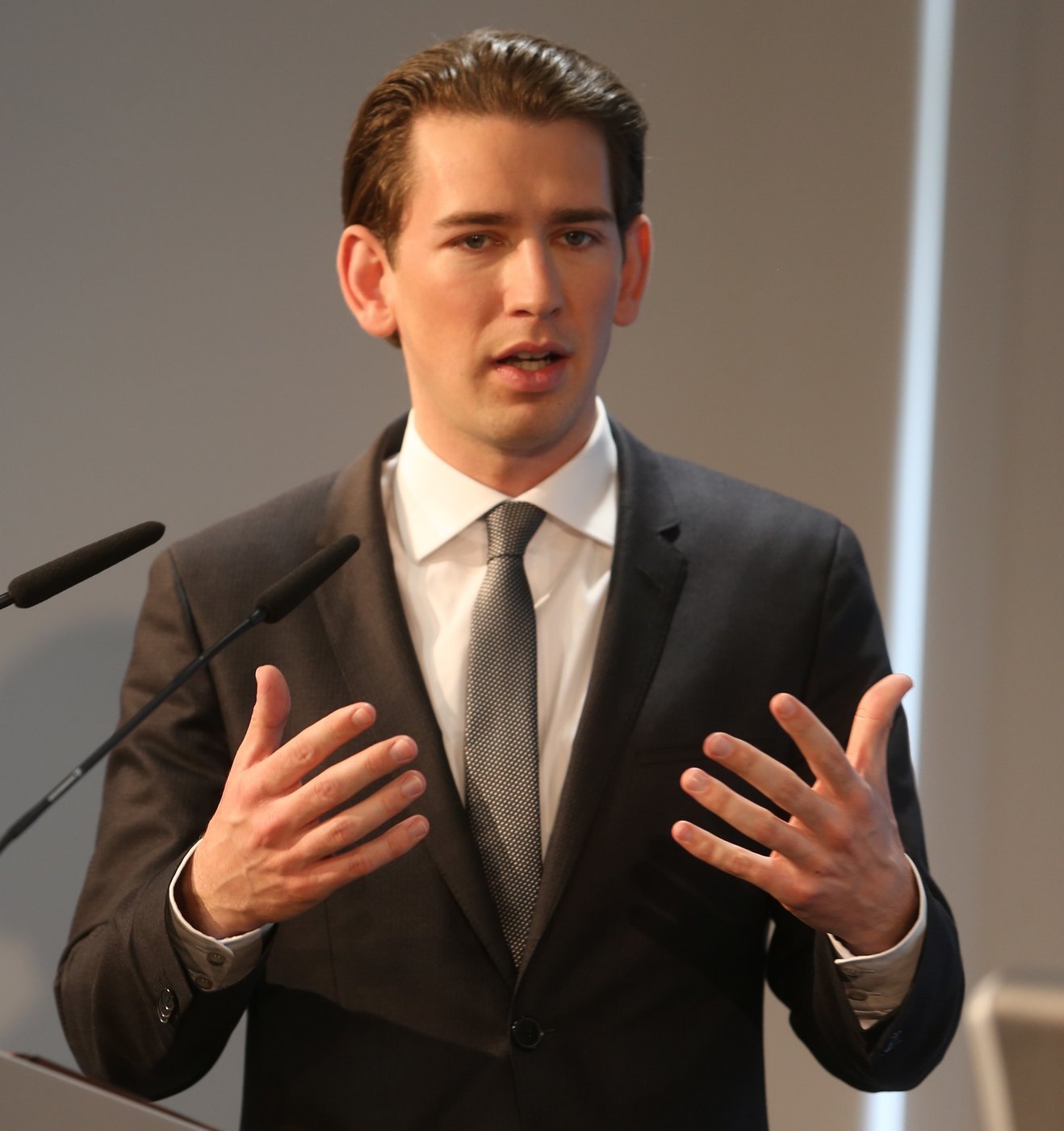 Sebastian Kurz, österreichischer Politiker (ÖVP). Hier am 15. April 2016 in München. Titel des Werks: "Sebastian Kurz (ÖVP) im April 2016"